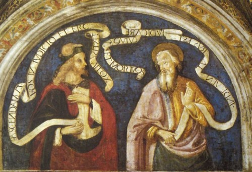 Pinturicchio e aiuti, Appartamento Borgia, Sala del Credo, XVI secolo, Vaticano